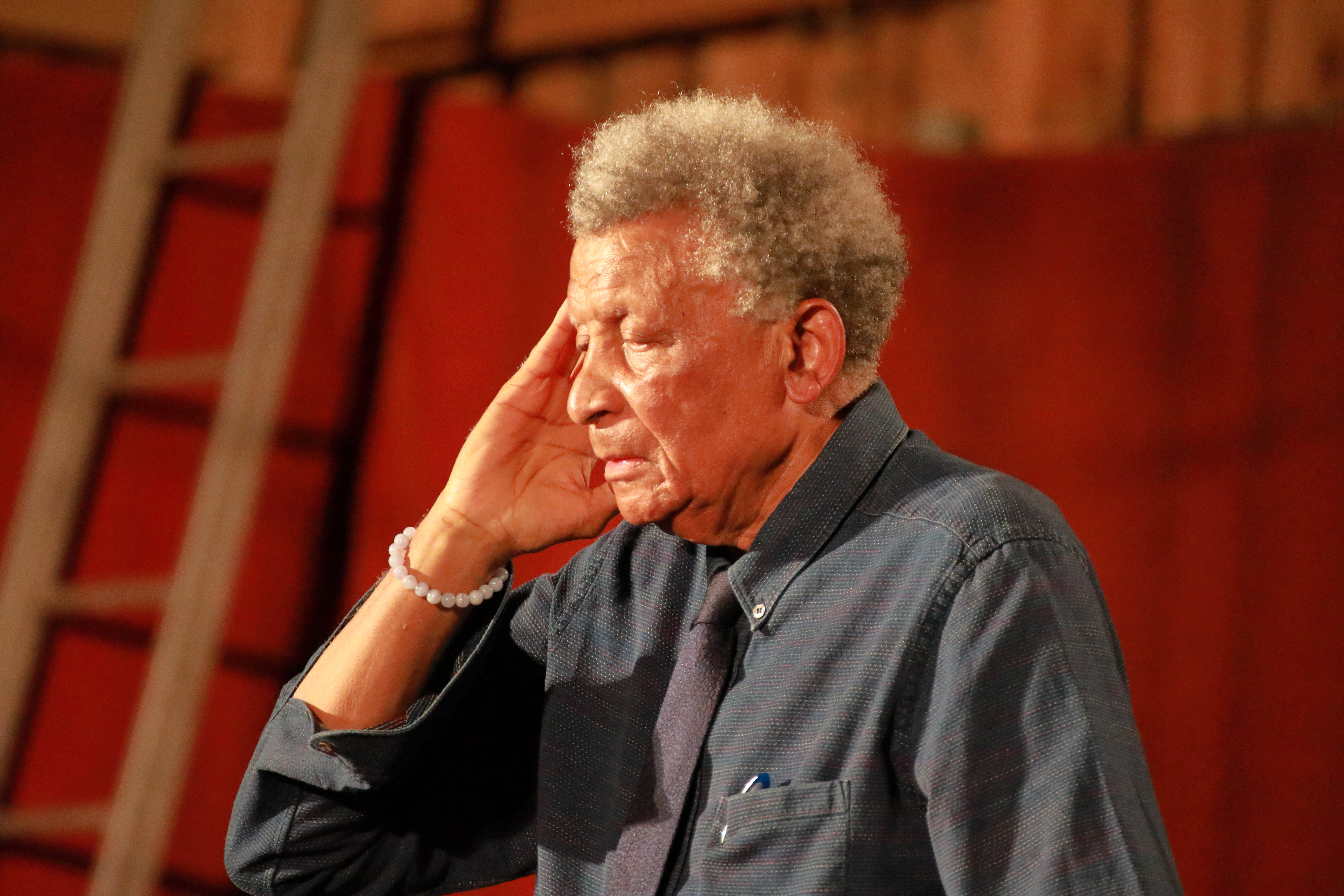 Der südafrikanische Komponist und Pianist Abdullah Ibrahim auf dem INNtöne Jazzfestival 2019.